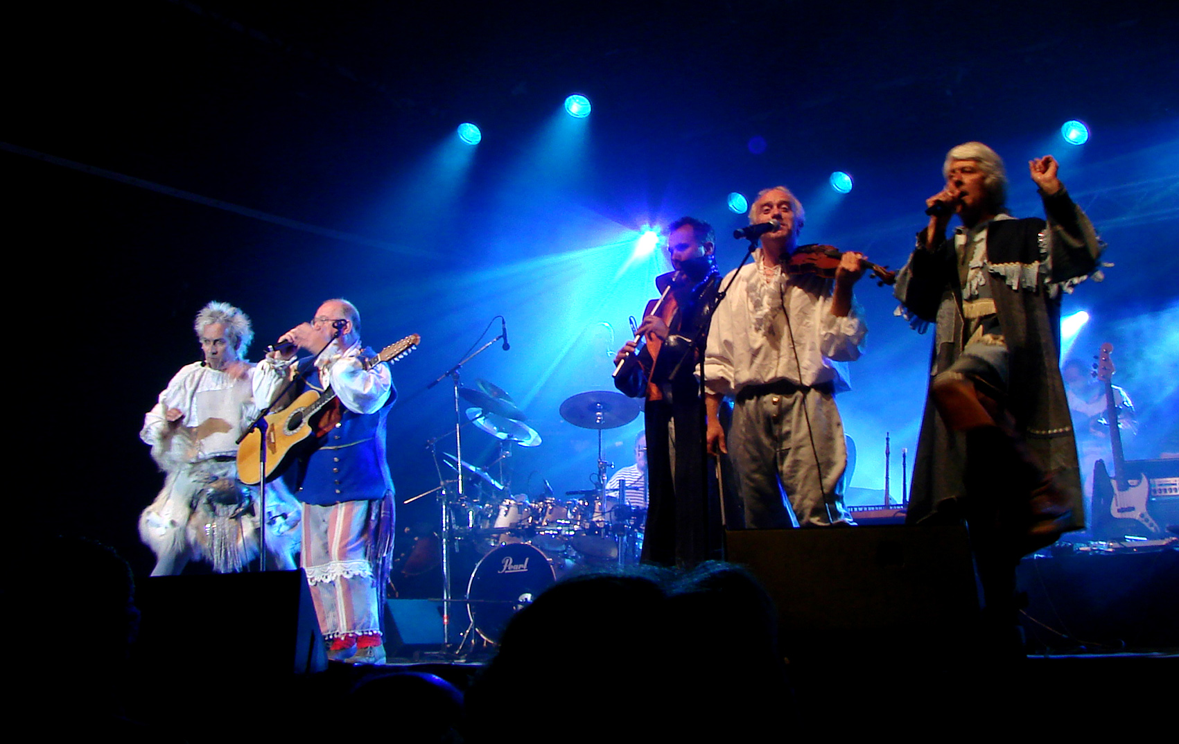 Tri Yann, à l'Aymon Folk Festival, Bogny-sur-Meuse, le 4/08/2007.